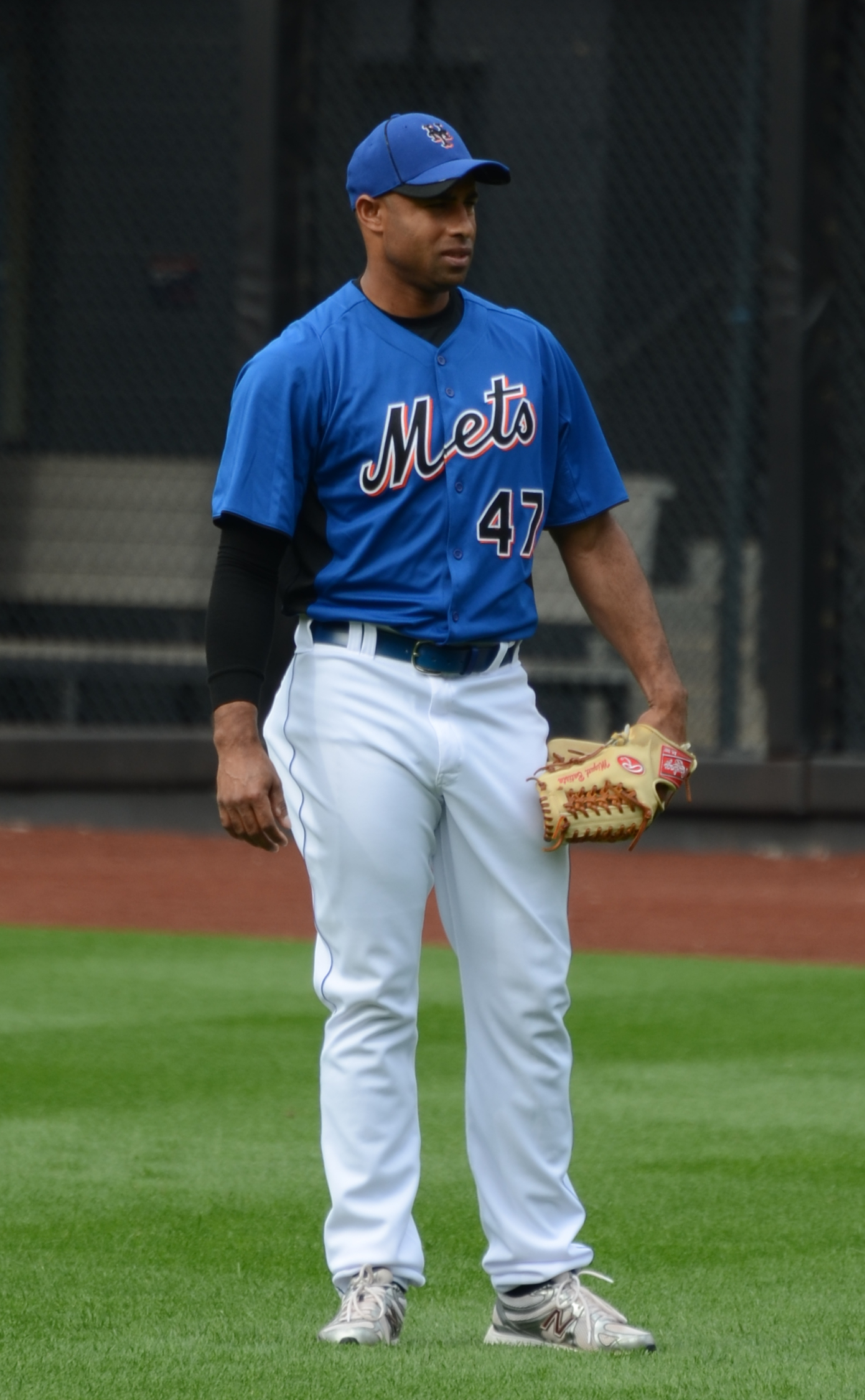 Miguel Batista